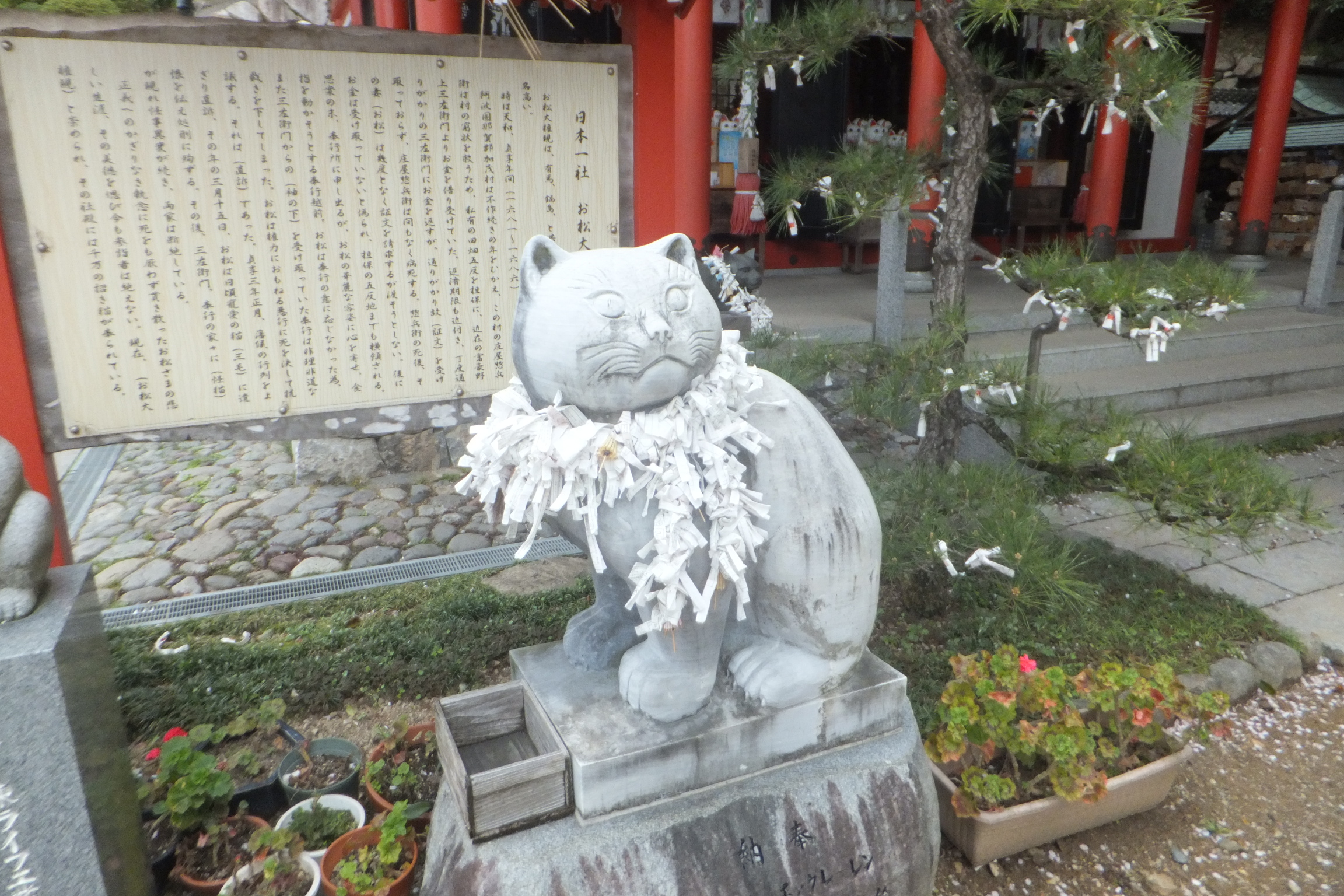 お松大権現 2014年4月4日